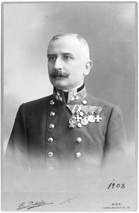 Porträtfotografie von Eugen Hordliczka